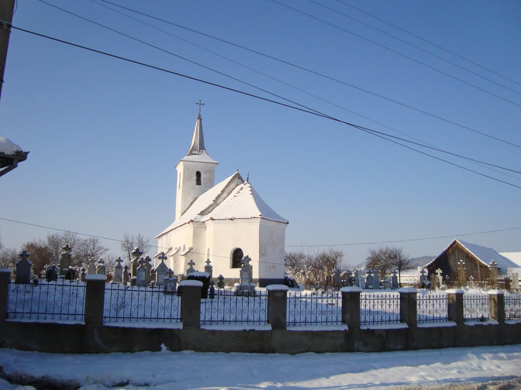 Biserica „Cuvioasa Paraschiva”